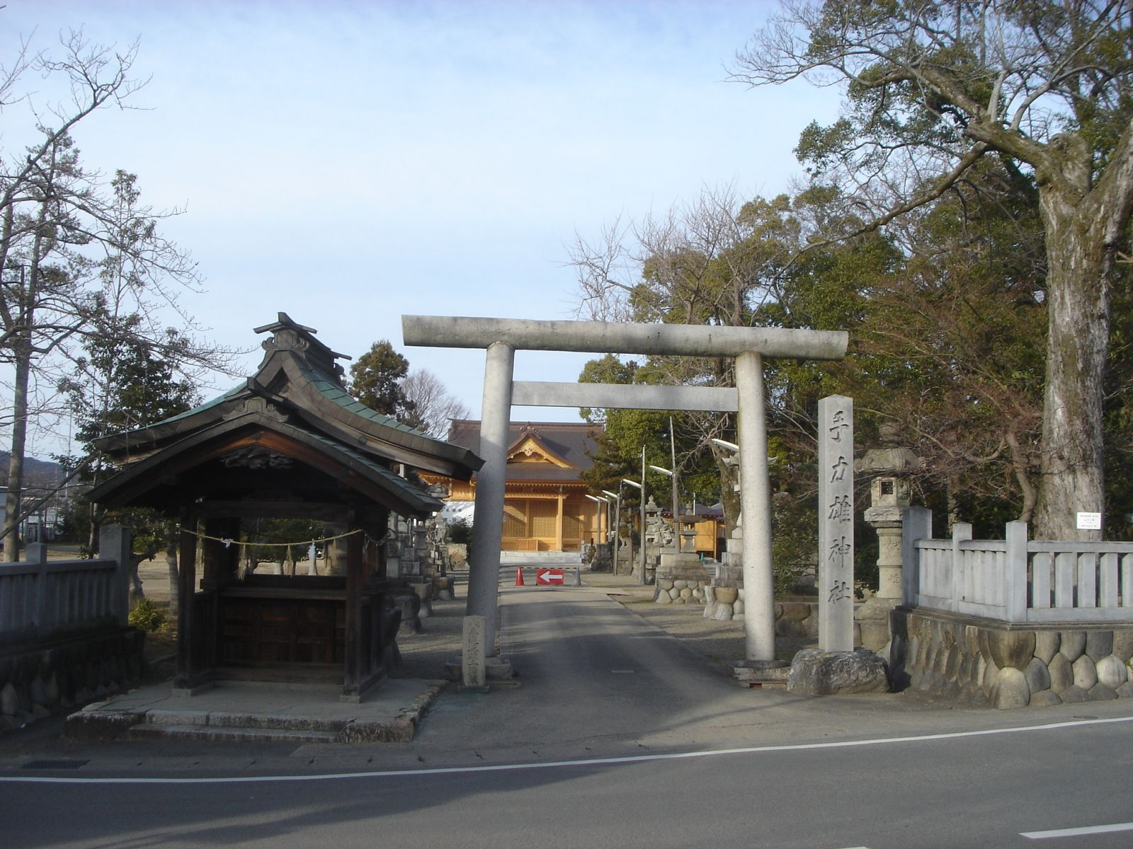 Tejikara-O-jinjya in Gifu(手力雄神社,Gifu,Gifu,Japan(岐阜県岐阜市)で撮影。